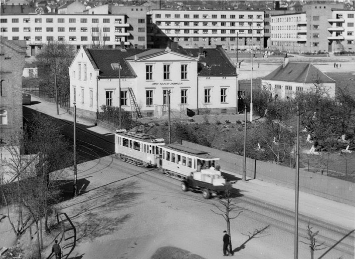 Oslo Sporveier. Trikk motorvogn 23 type AEG, tilhenger 502 type SS og lastebil i Sandakerveien ved Bjølsen Valsemølle. Uvanlig at vogn type AEG trakk på "stor" tilhenger. Sandakerveien 63, Sandakerbakken i midten (oppført av brukseier Iver Olsen 1854, siden 1933 barnehage). Lavblokker langs Hans Nielsen Hauges gate i bakgrunnen. Sandakerbakken er et kulturminne